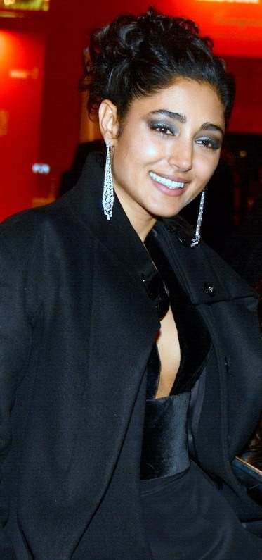 Golshifteh Farahani à la cérémonie des César